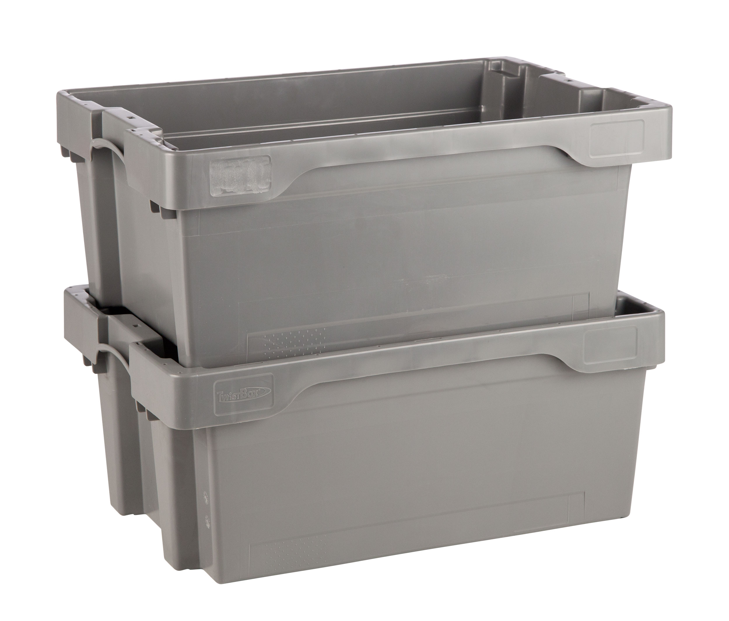 Drehstapelbehälter gestapelt.